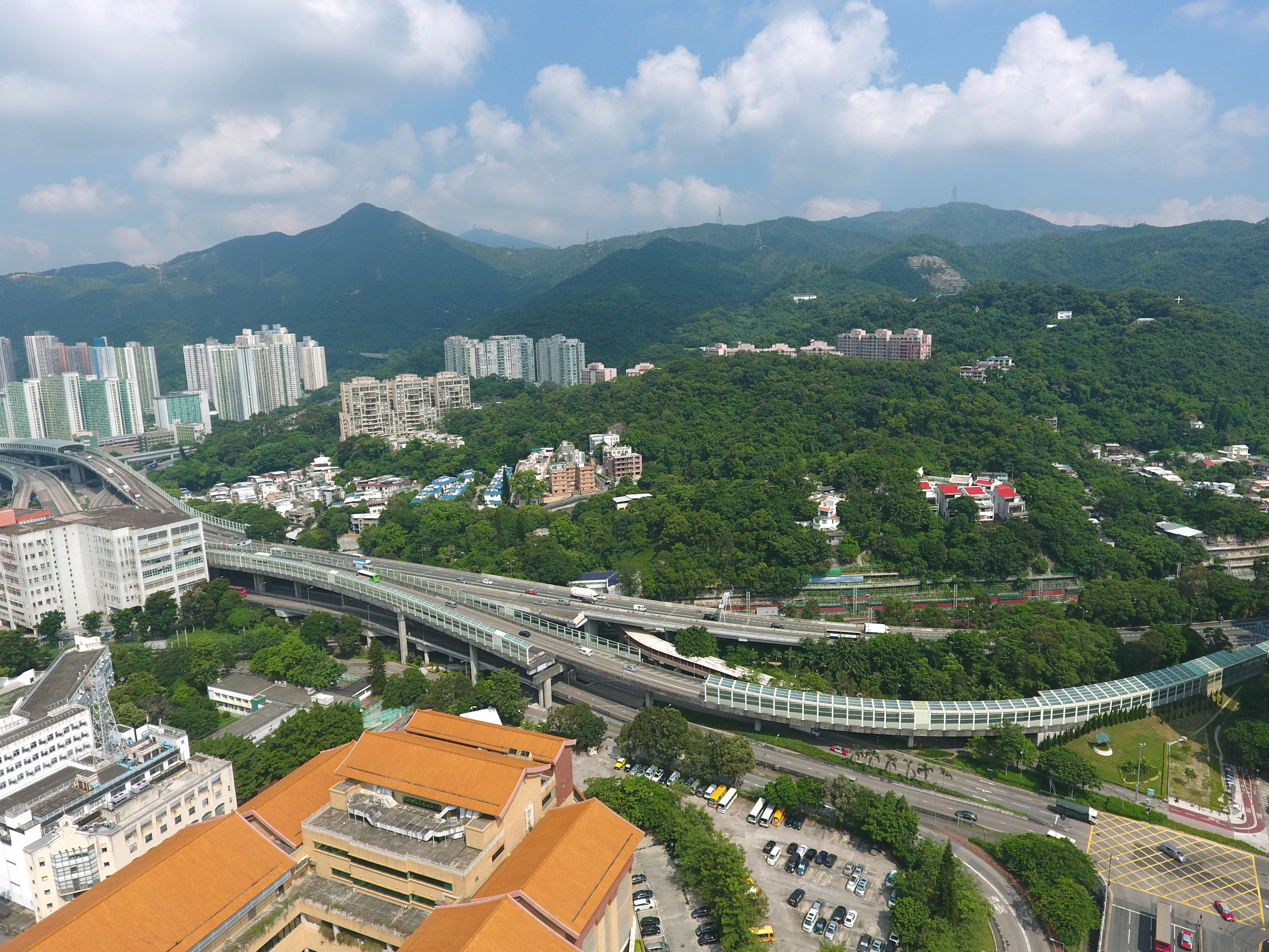 Tung Lo Wan